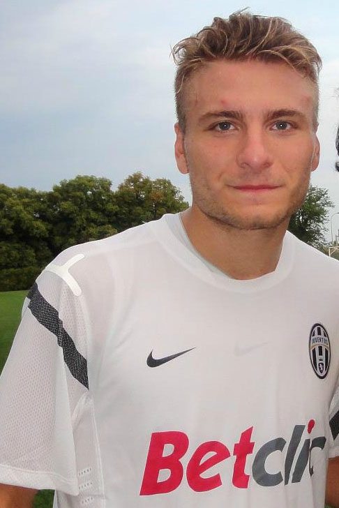 Il calciatore italiano Ciro Immobile in allenamento alla Juventus.